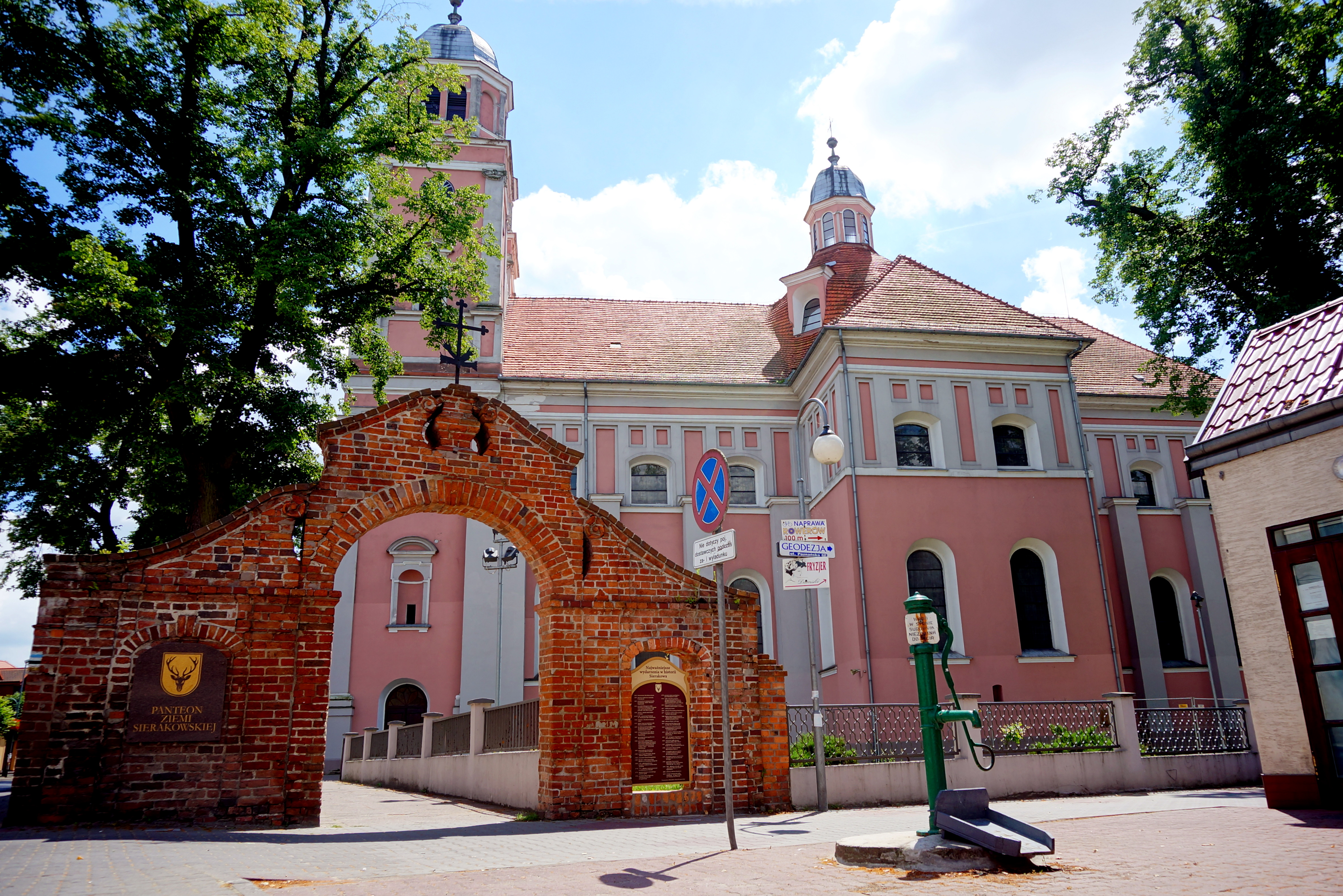 Sieraków, zespół klasztorny bernardynów, XVII, XIX